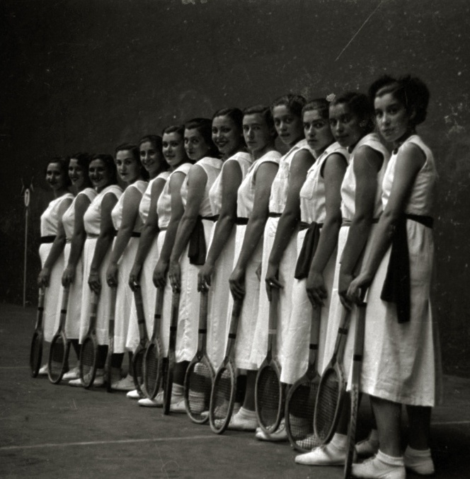 Título original: Grupo de raquetistas posando en un frontón (4/5) Localización: San Sebastián (Guipúzcoa)